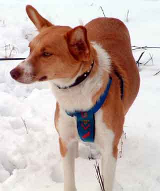 Podenco Sheila